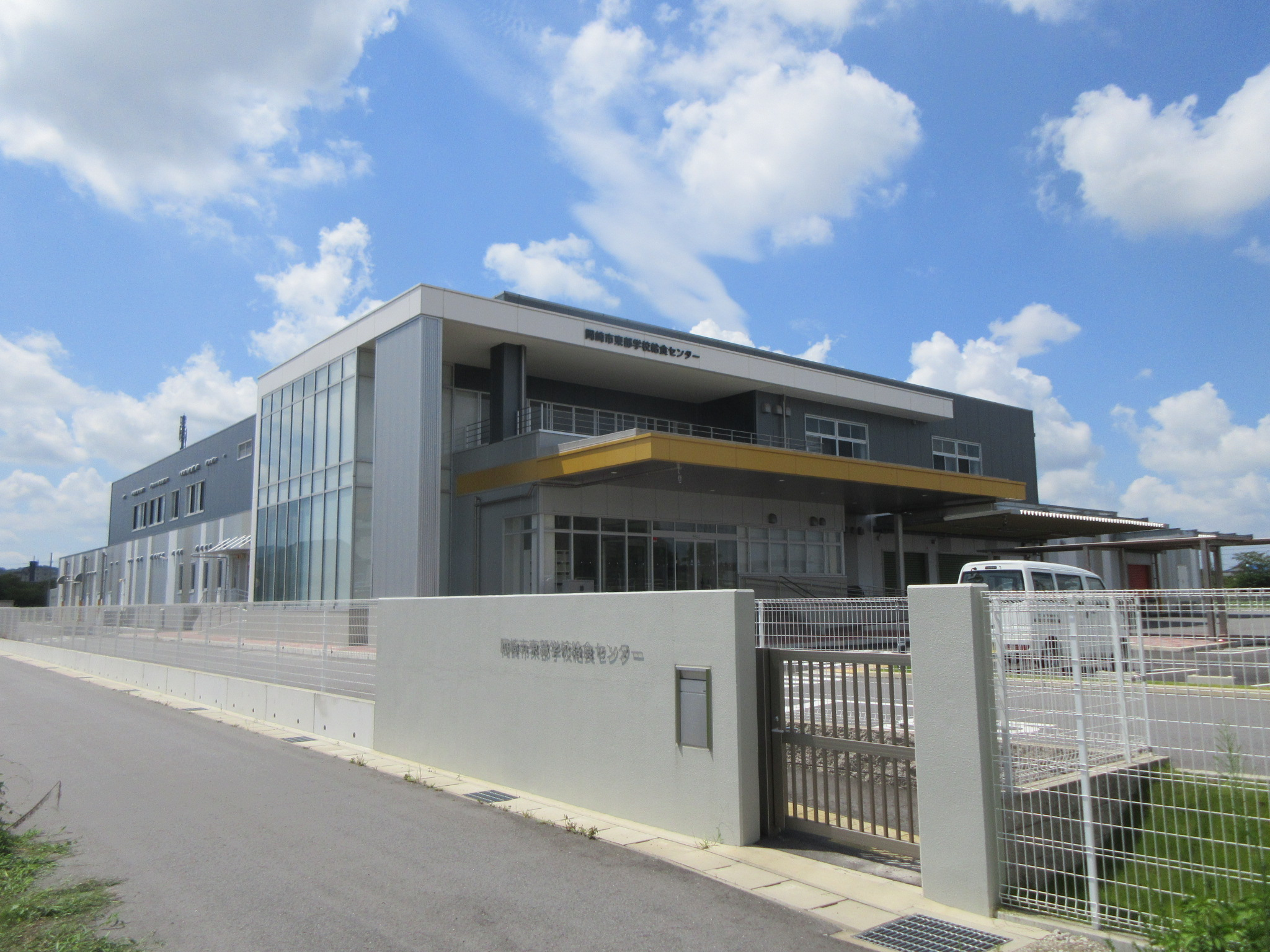 岡崎市東部学校給食センター（岡崎市岡町）